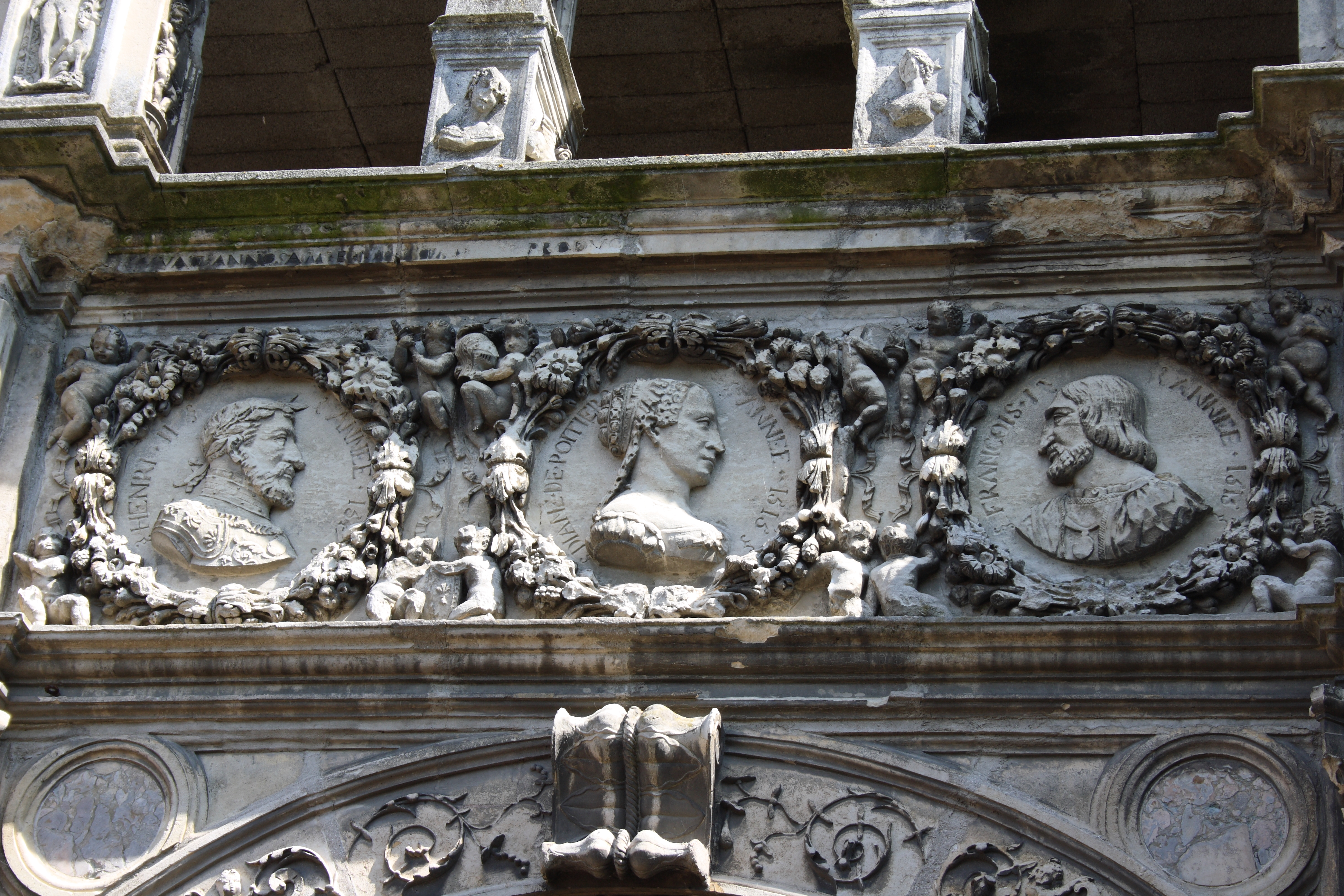 Hôtel Chabouillé in Moret-sur-Loing im Département Seine-et-Marne in der Region Île-de-France (Frankreich), Renaissancefassade, Medaillons mit den Büsten von Heinrich II., Diana von Poitiers und Franz I.